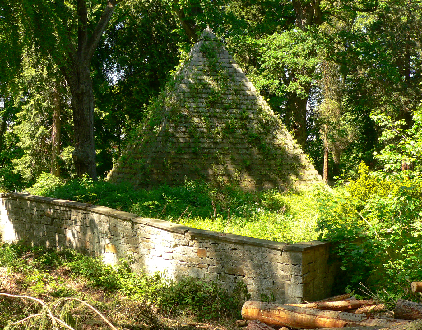 Mausoleum Derneburg